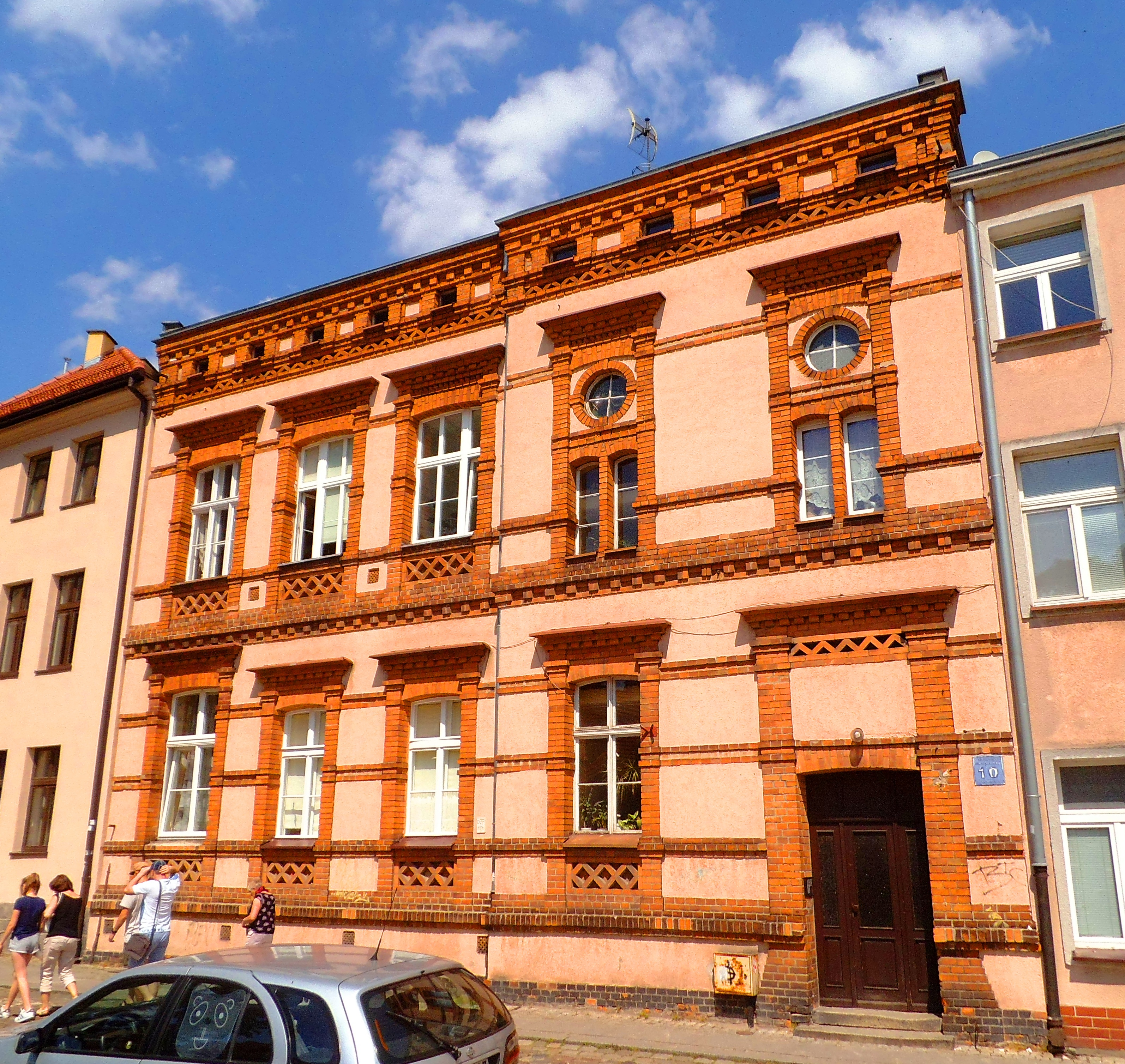 Dawny Szpital Miejskie w Toruniu2